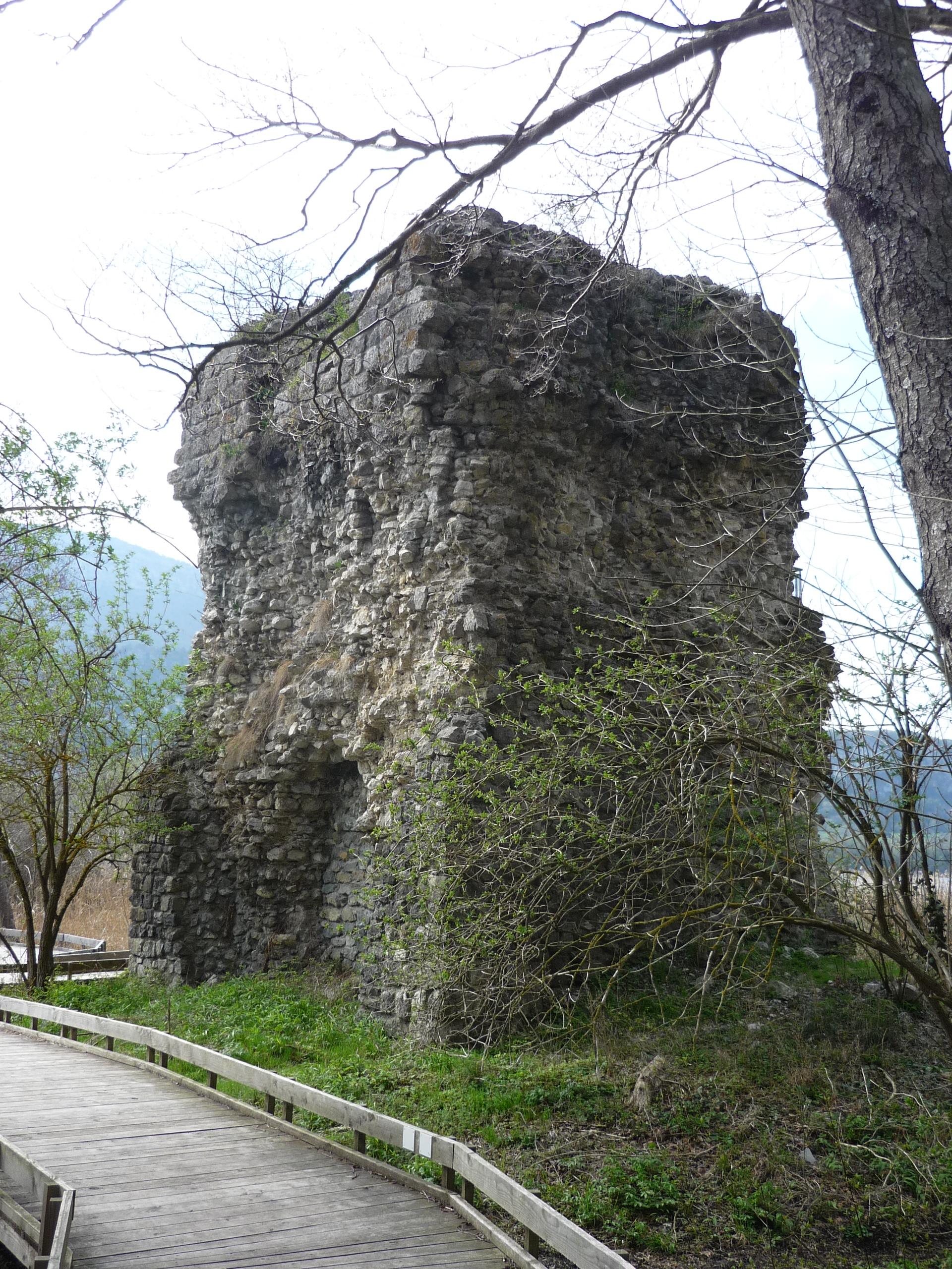 La tour de Beauvivier dans la réserve naturelle du Bout-du-Lac, Doussard, Haute-Savoie, France